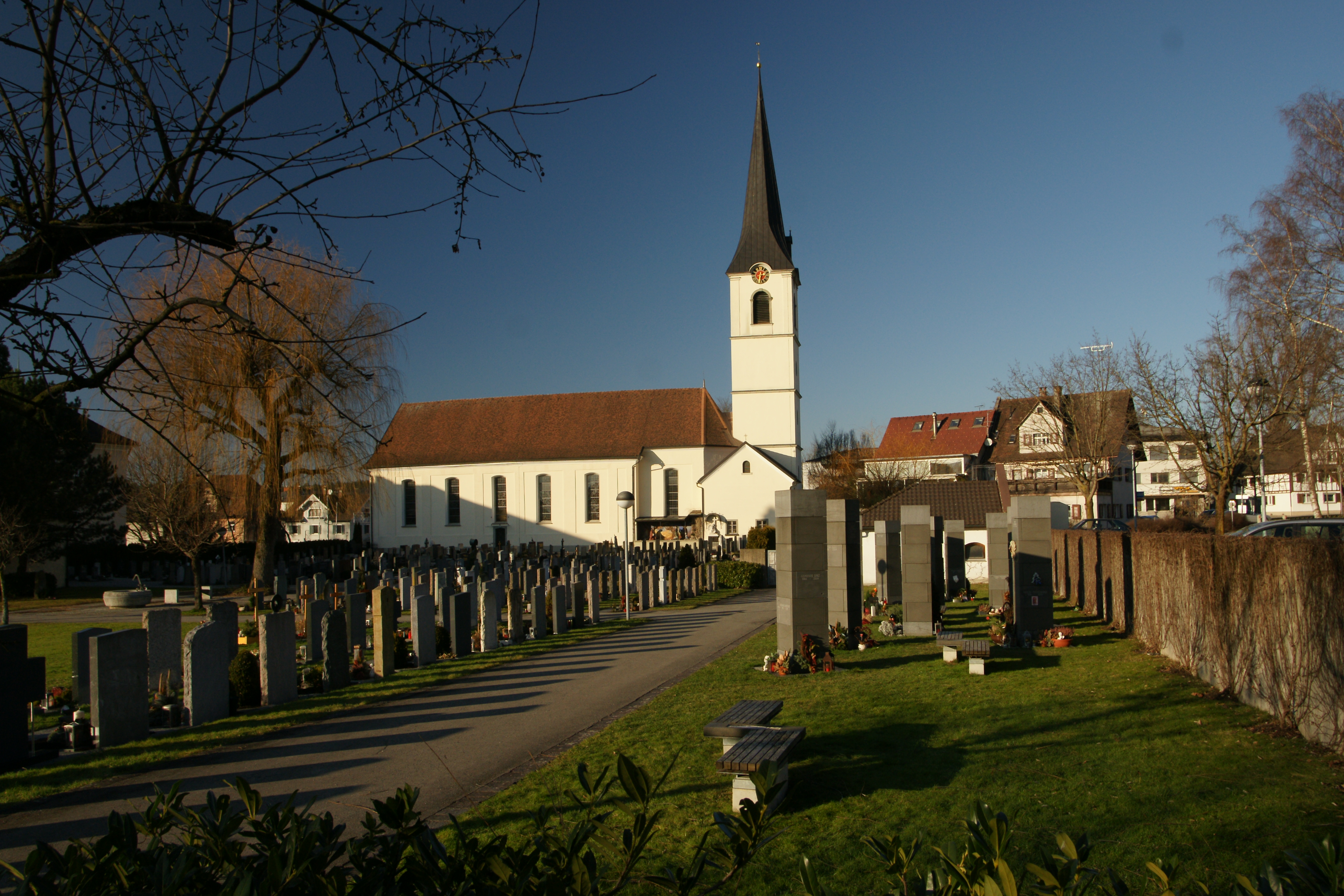 Pfarrkirche hl. Martin in Hörbranz. Kreuzwegstationen in der Apsis von Hubert Fessler 1954; Glasmalereien von der K. Bayerischen Hofglasmalerei F.X. Zettler, München 1895.